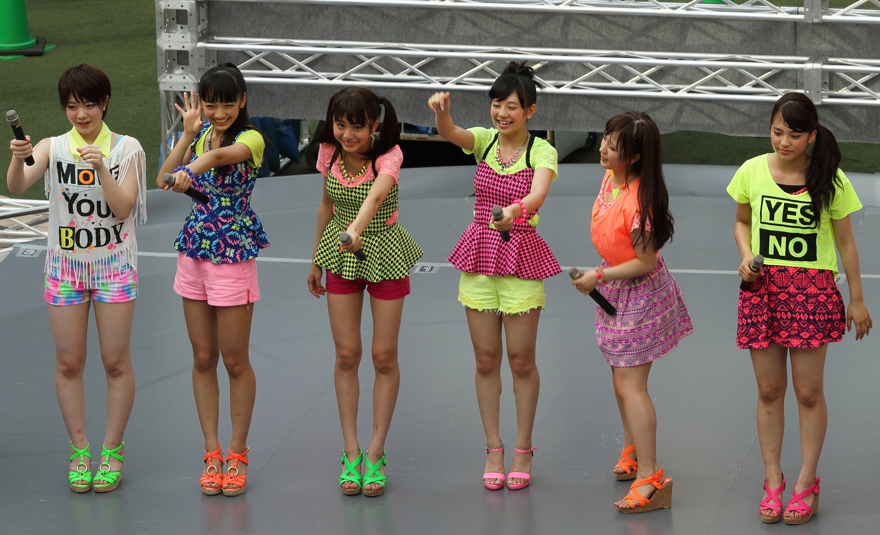 たまプラーザテラス フェアリーズ x ジュエルペット ミニライブ